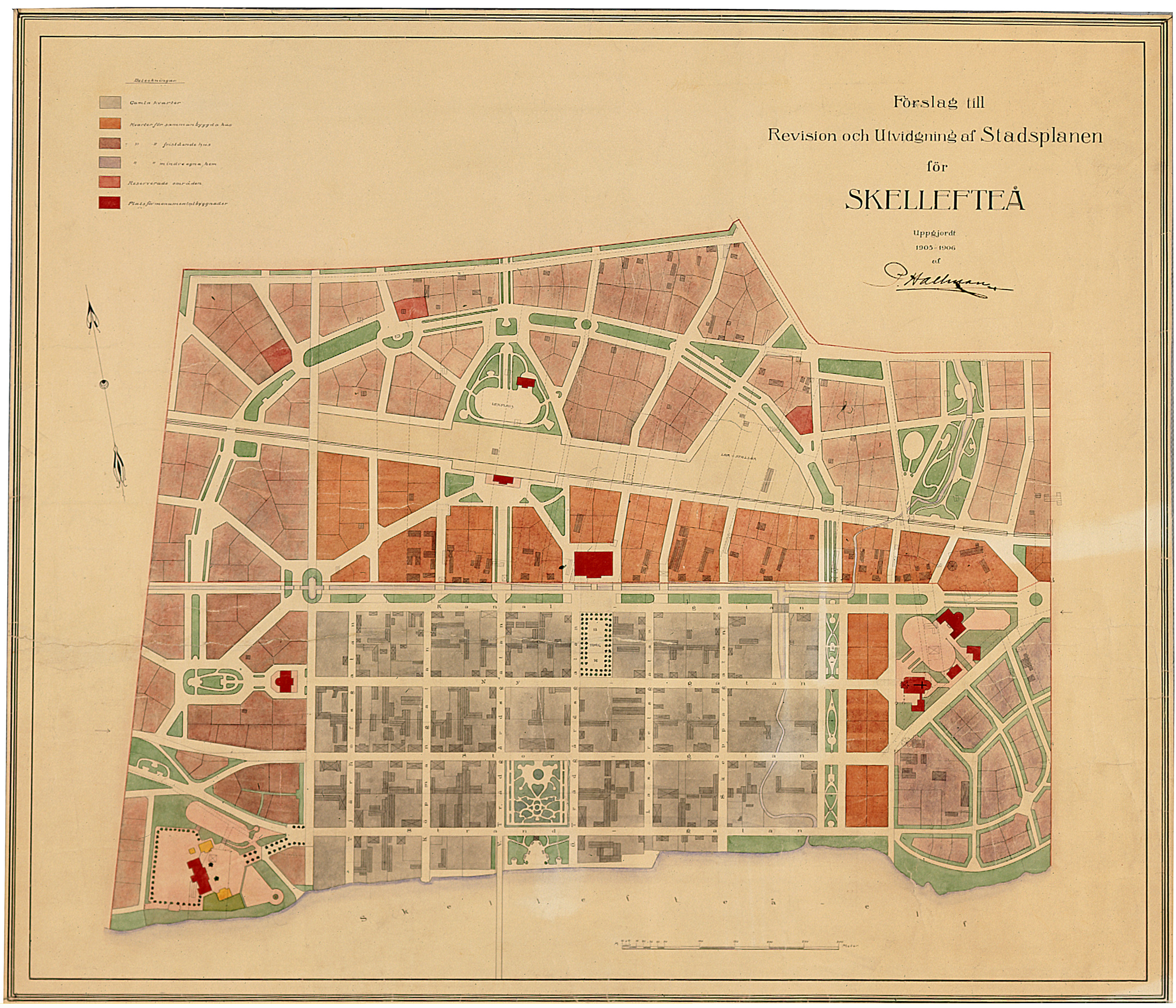 Förslag till Revision och Utvidgning af Stadsplanen för Skellefteå